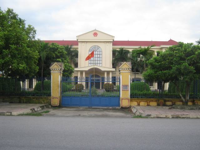 Ủy ban nhân dân huyện Yên Khánh - thị trấn Yên Ninh